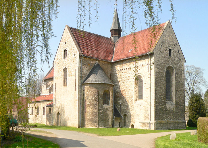 St. Johannis-Kirche Süpplingenburg